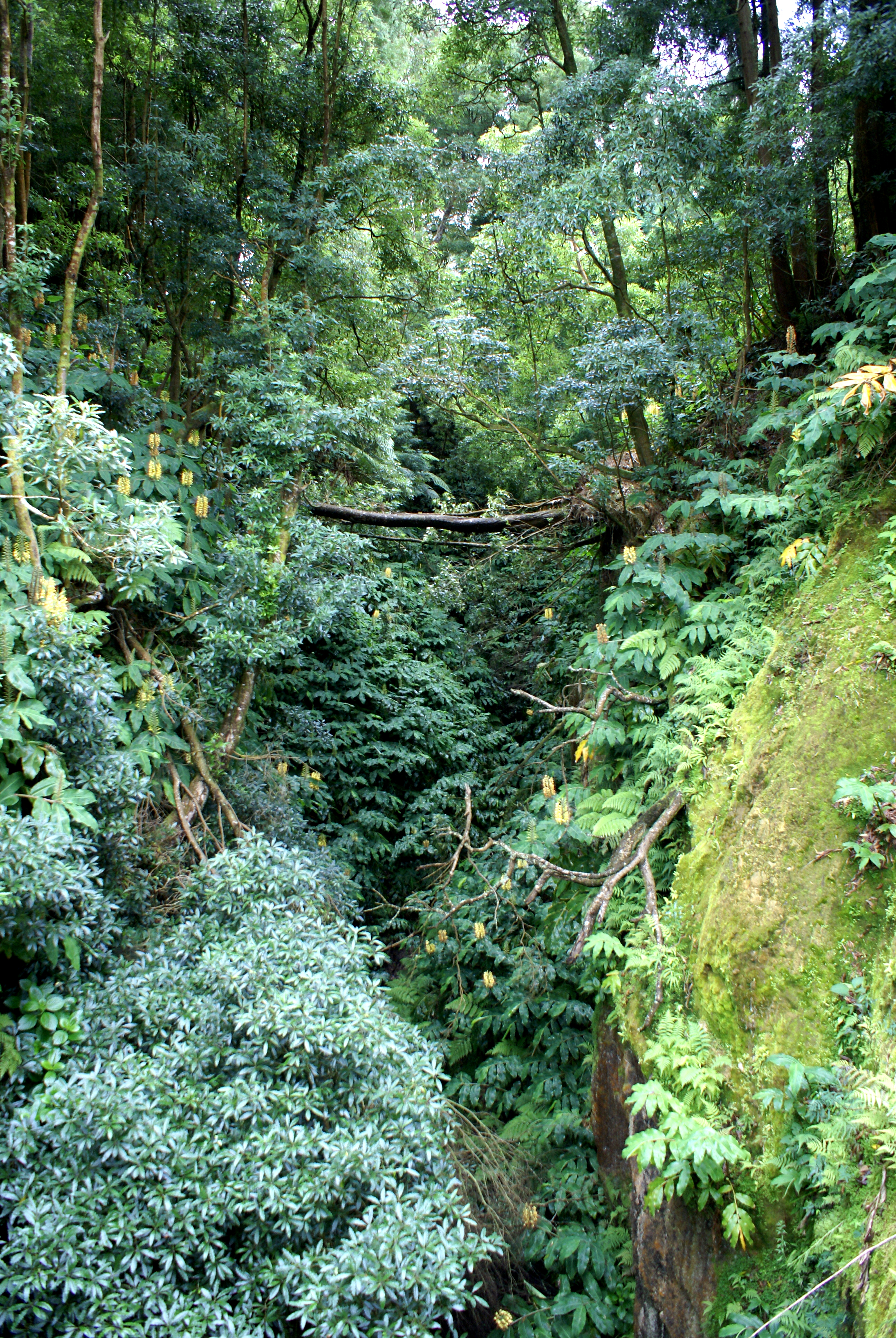 Termas da Ribeira Grande, paisagem envolvente, ilha de São Miguel, Açores